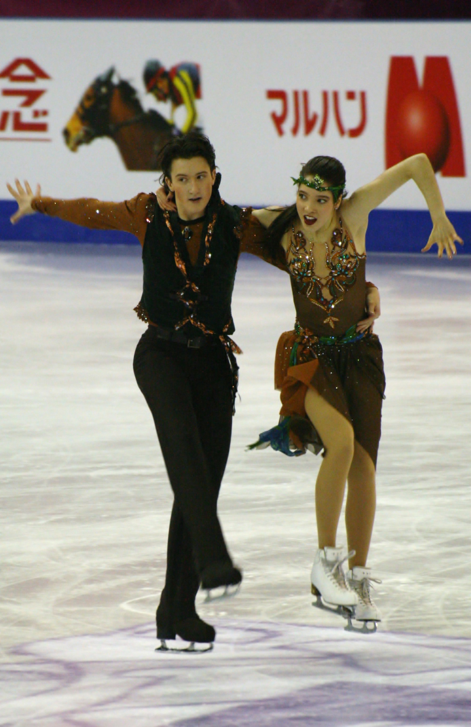 Лоррейн Макнамара и Квин Капентер (США) на финале Гран-при по фигурному катанию среди юниоров 2015-2016.